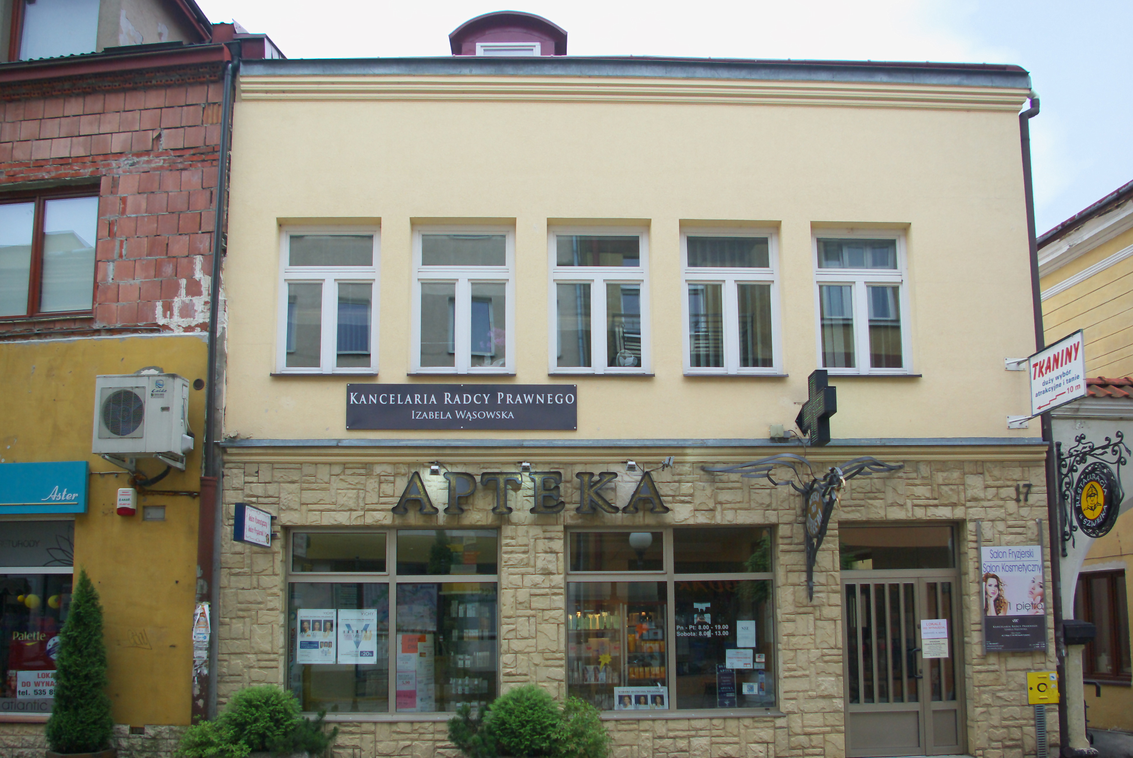 Kamienica przy ul. 3 Maja 17 w Sanoku